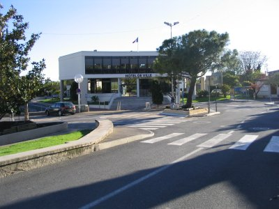 La Mairie de Castelnau-le-Lez dans l'Hérault. Image perso.